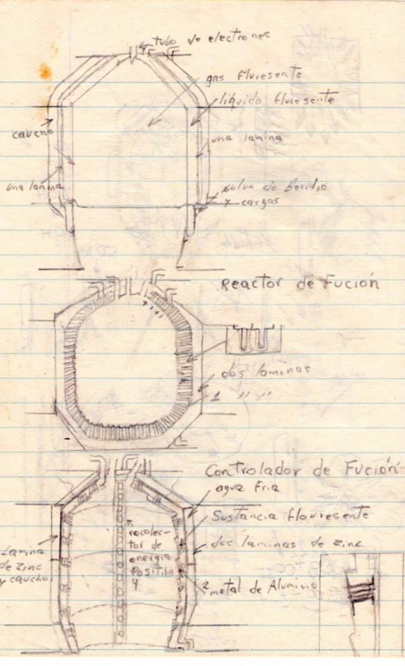 Bosquejo de un reactor de fusión de Iván Vargas Blanco